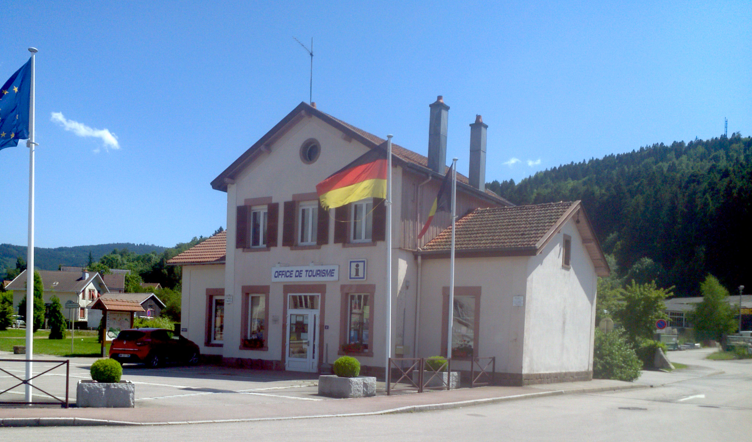 Bahnhof von Fraize, Lothringen